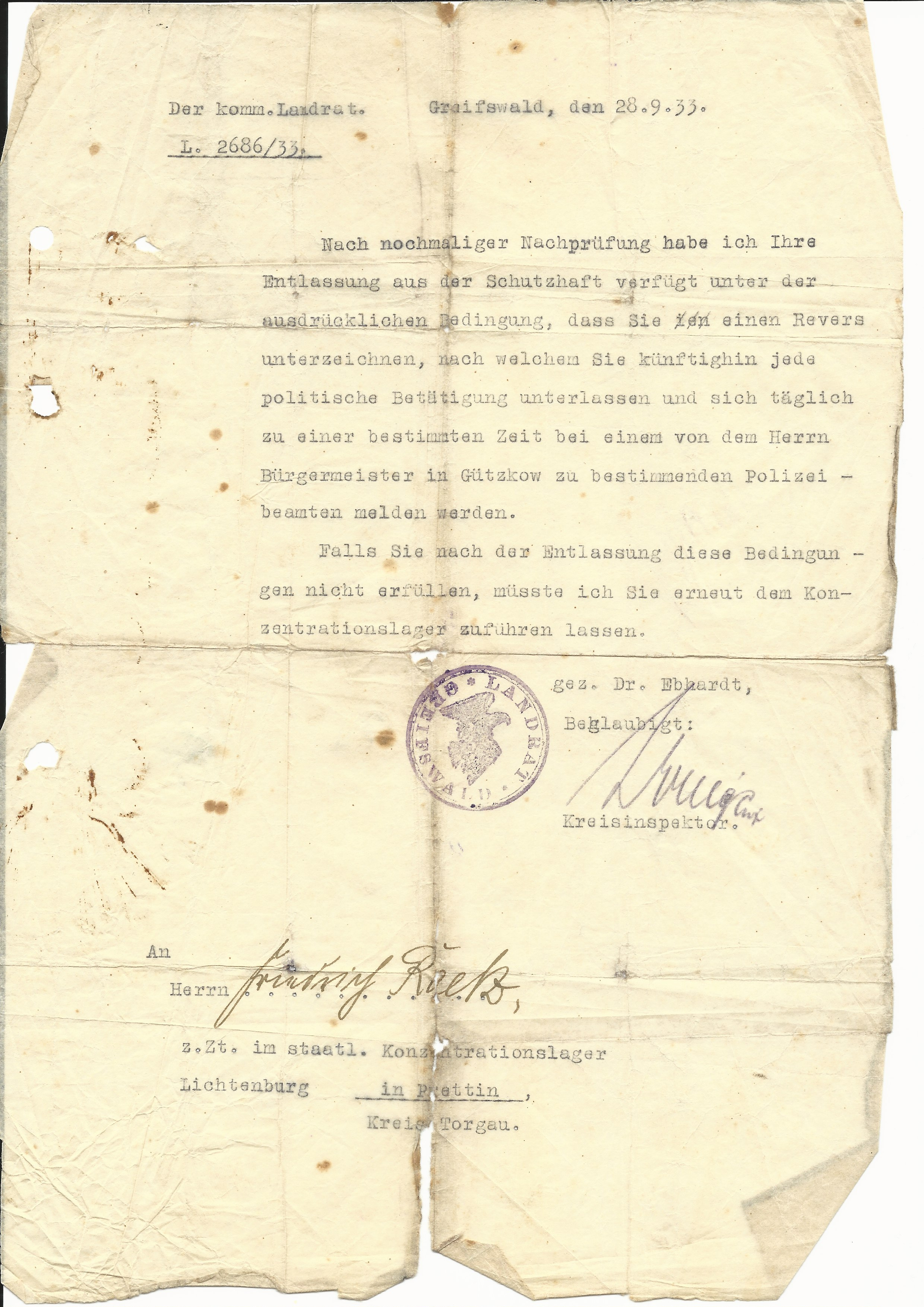 Entlassungsverfügung des Landrates vom 28.09.1933